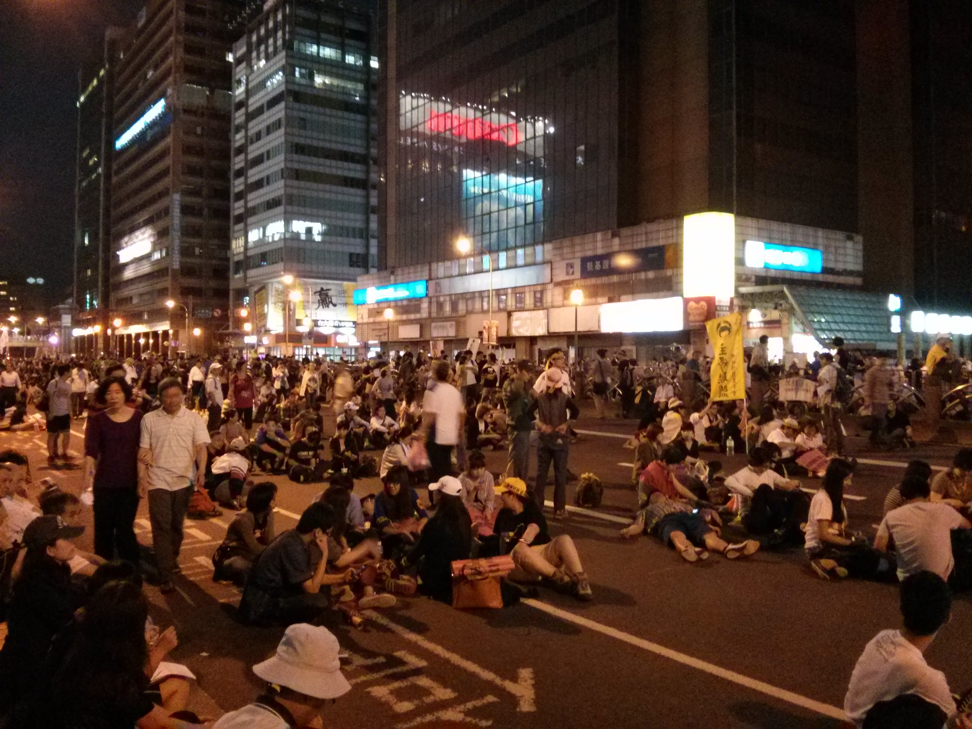 呼應林義雄反核四禁食行動，群眾佔領臺北市忠孝西路一景。